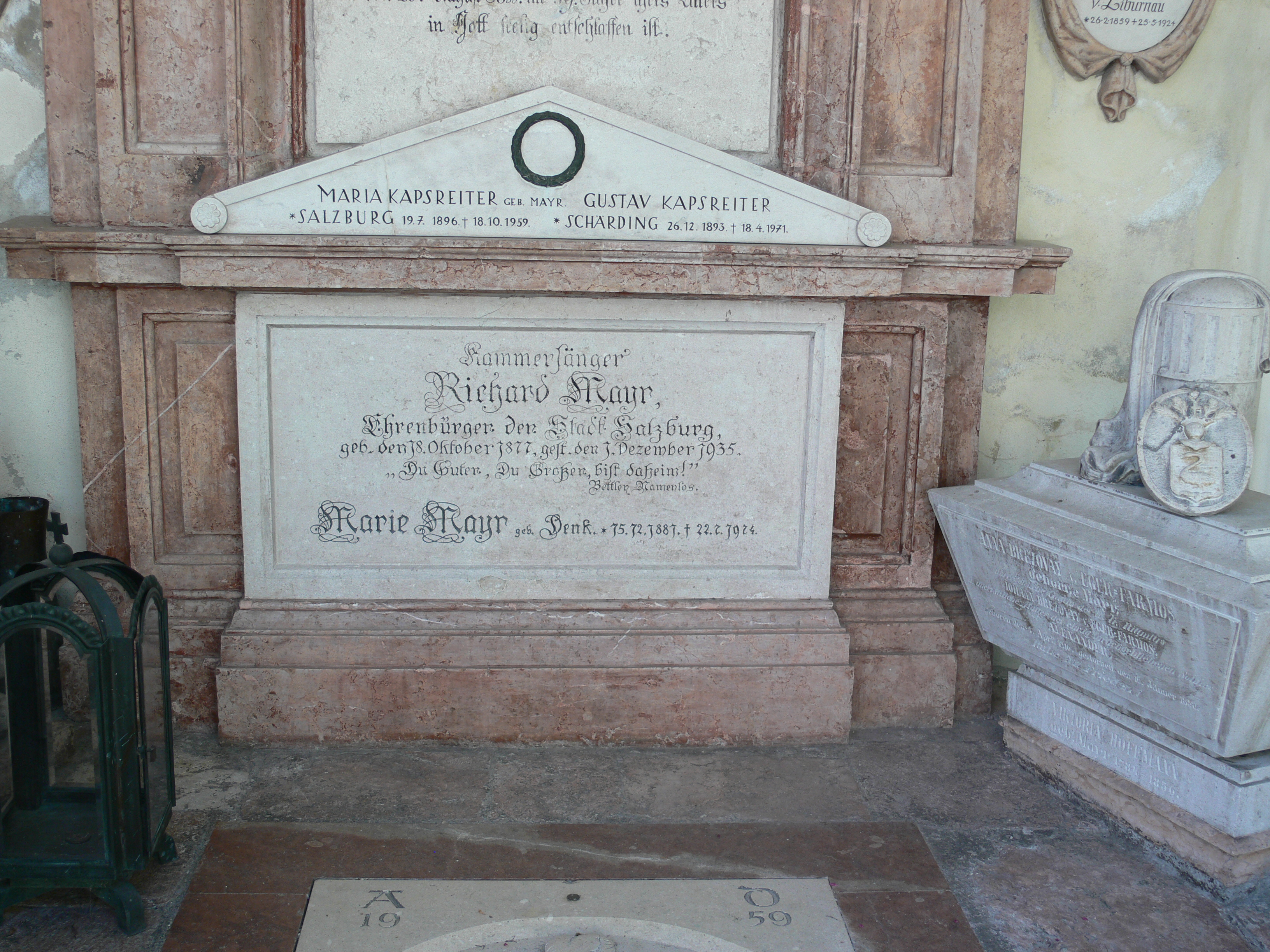 Petersfriedhof Salzburg Grabmal des Opernsängers Richard Mayr